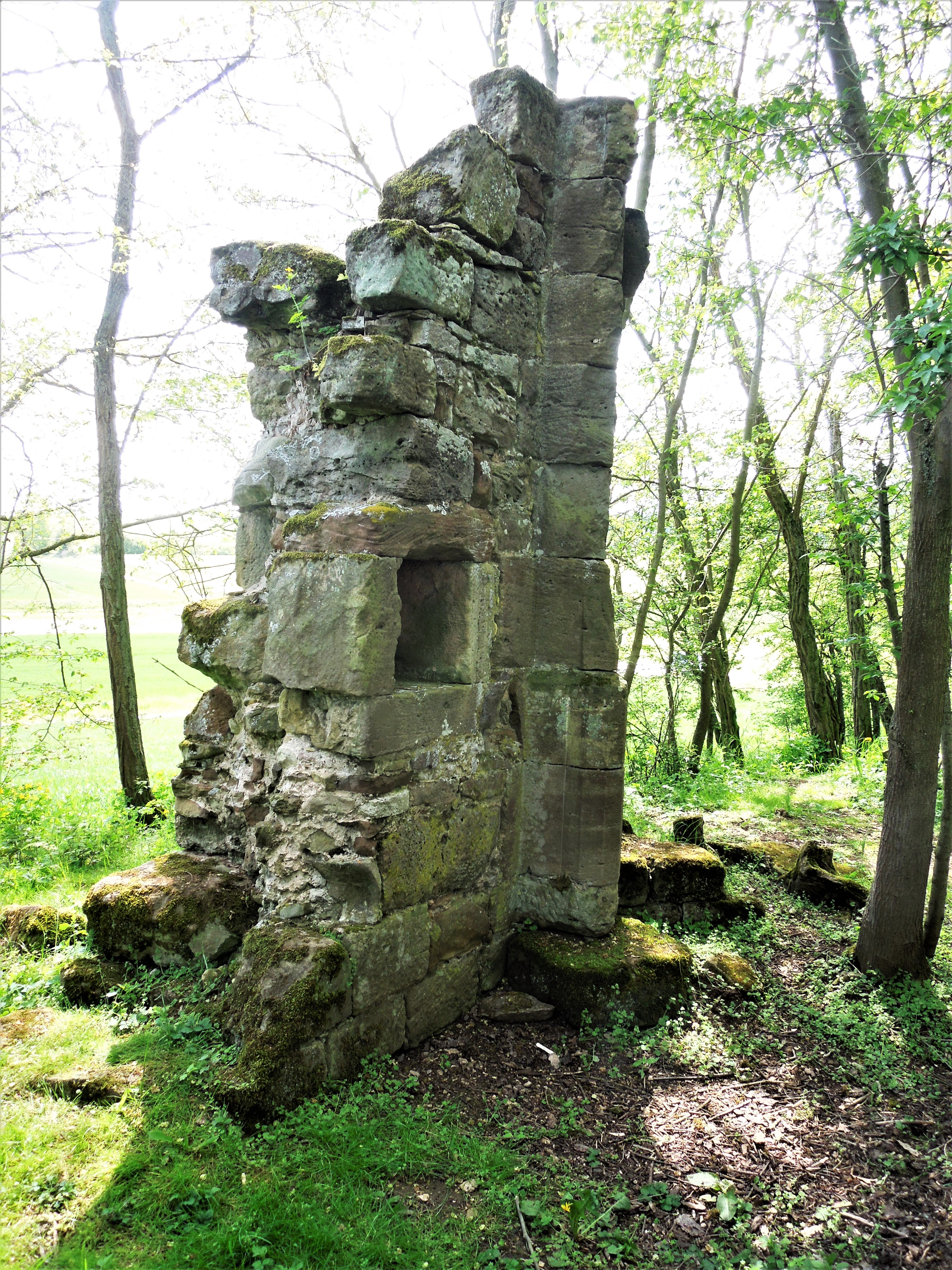 Reste der Kreuzkirche bei Züschen, letzter Rest des untergegangenen Dorfs Hertingshausen